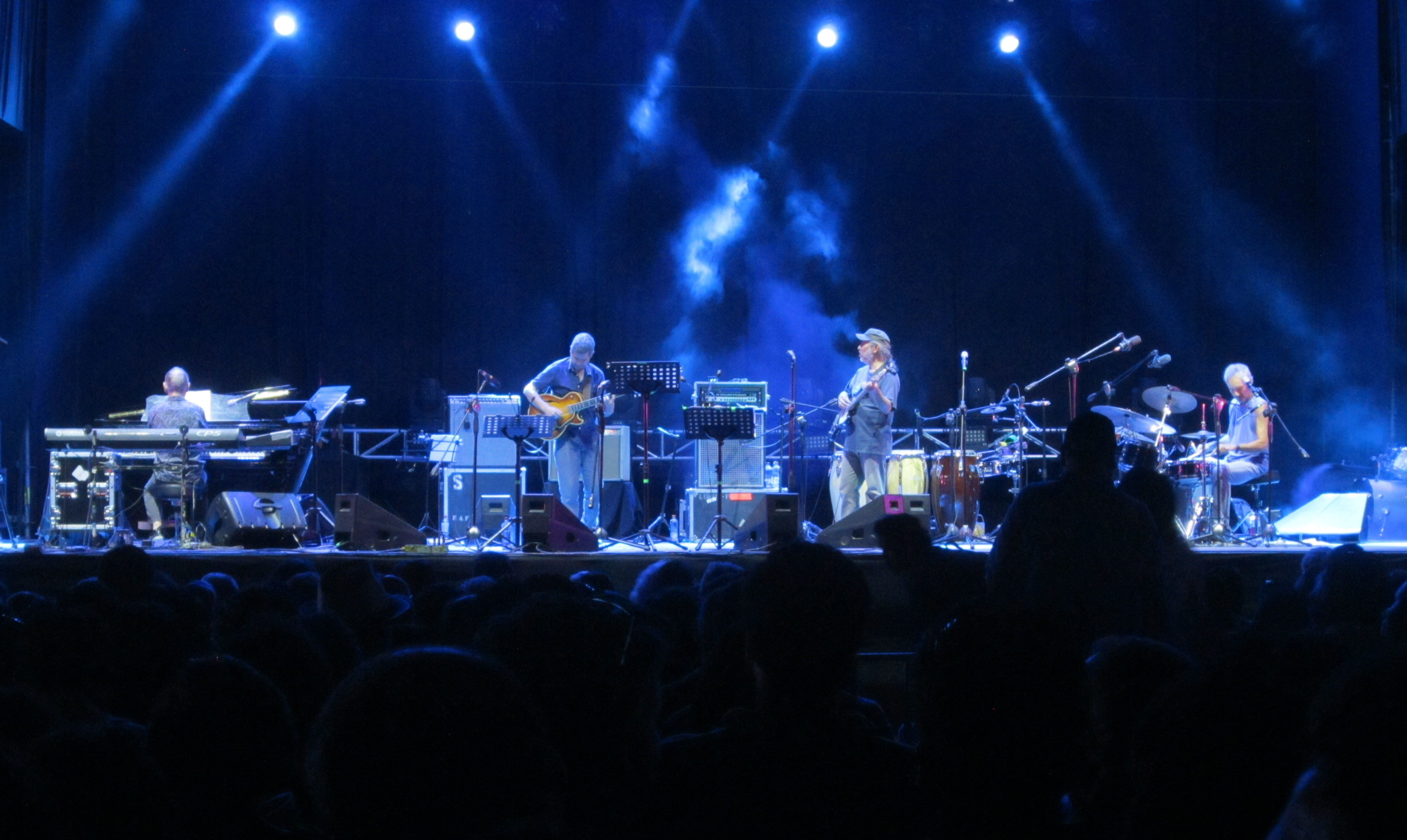 La Marraqueta en el Festival Providencia Jazz 2017